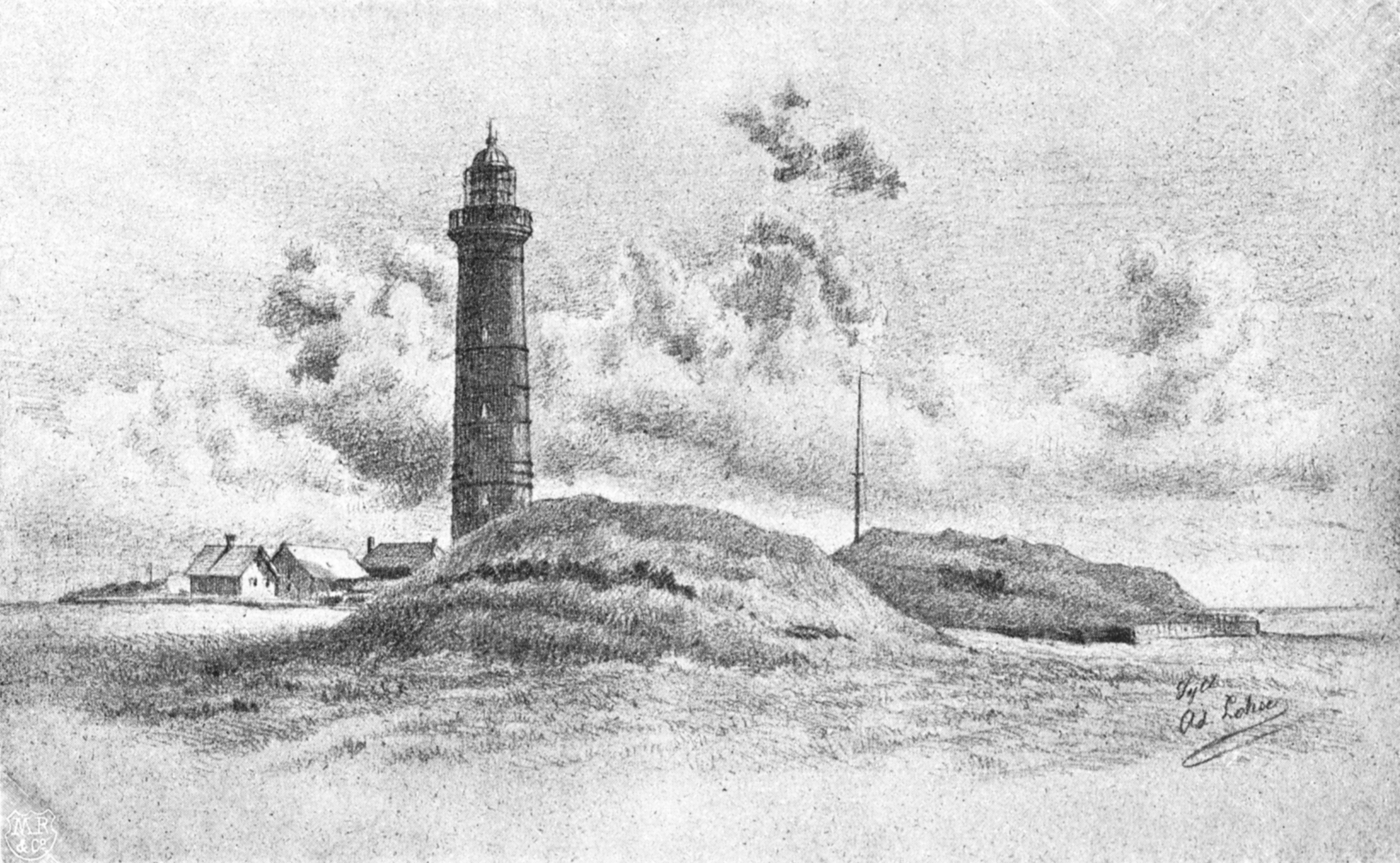 Der Leuchtturm von Kampen mit Hünengäbern, Zeichnung von Adolf Lohse um 1895